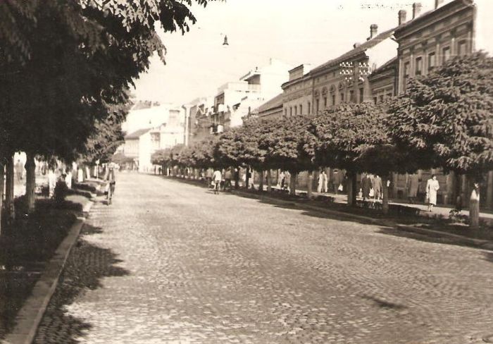 Karađorđeva ulica, Donji šor, Šabac